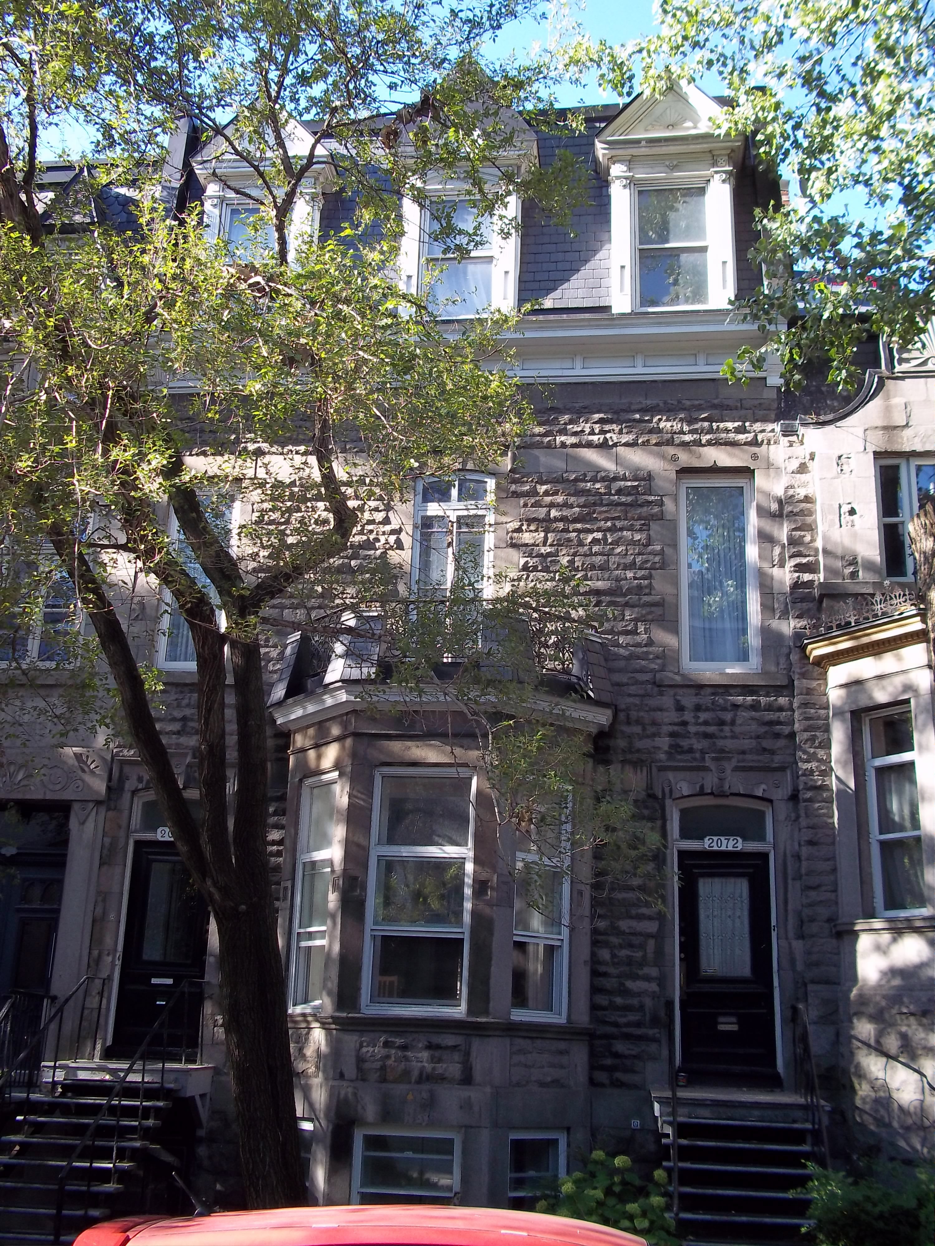 Maison Walter-Marriage, 2070-2072, rue Jeanne-Mance, Montréal